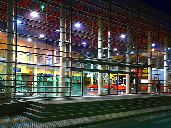 Intercambiador Renfe-Bus de Orihuela.